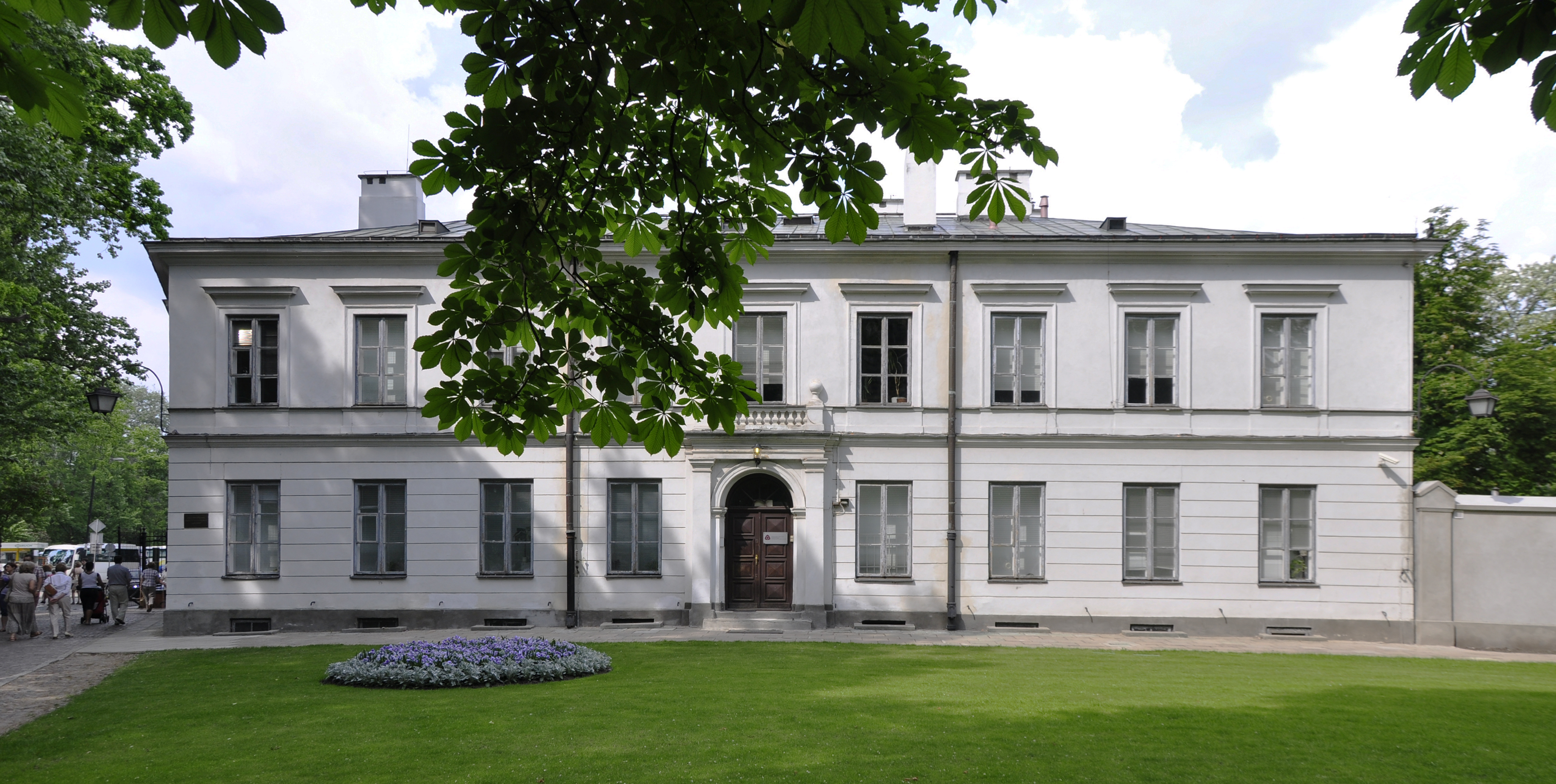 Warschau, Dawna siedziba Narodowego Instytutu Dziedzictwa (NID) vormals: Krajowy Ośrodek Badań i Dokumentacji Zabytków (KOBiDZ) in der Ulica Szwoleżerów 9